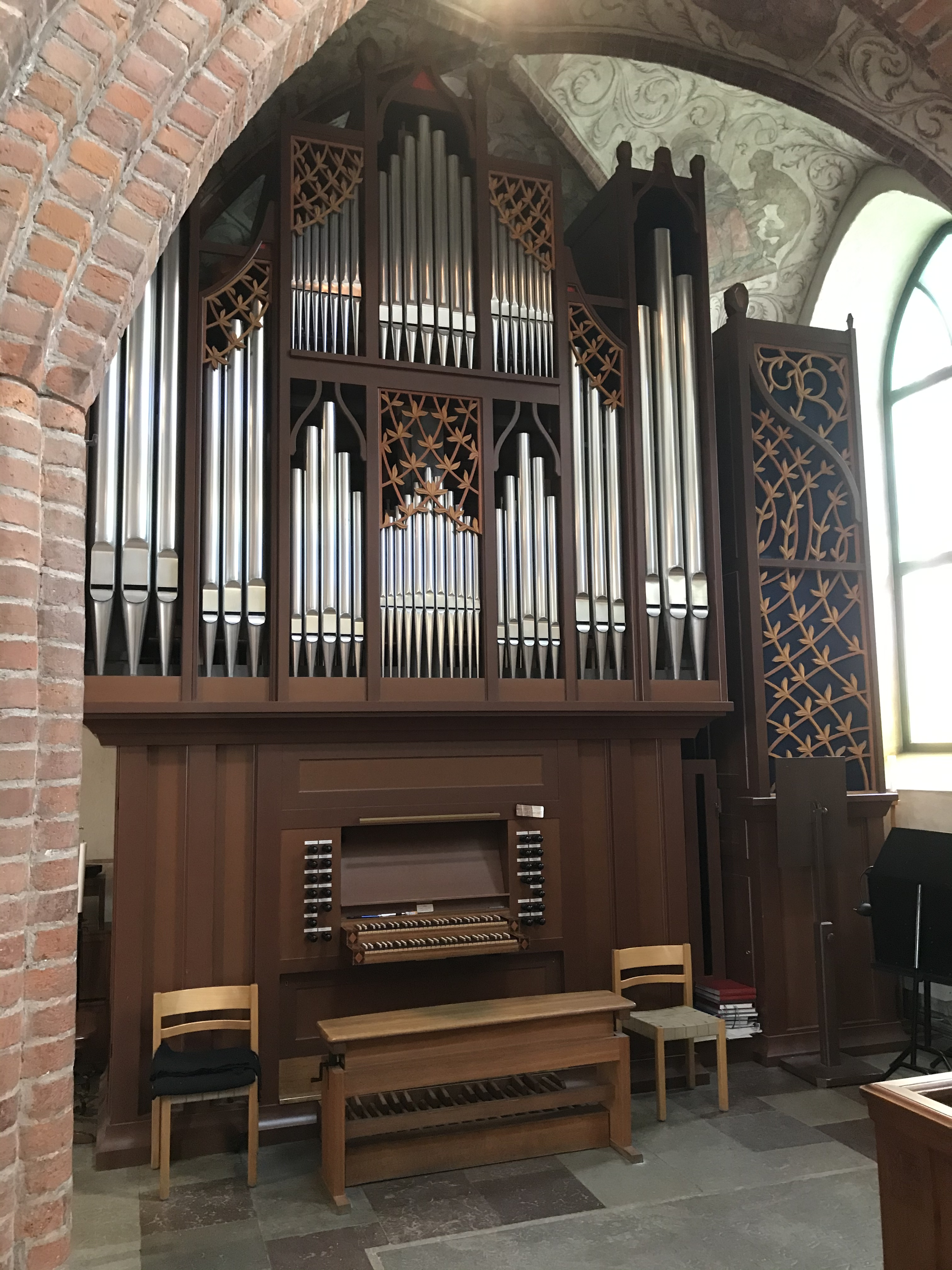 Orgeln i Helga Trefaldighets kyrka, Uppsala. Byggd 1993 av Robert Gustavsson orgelbyggeri AB.